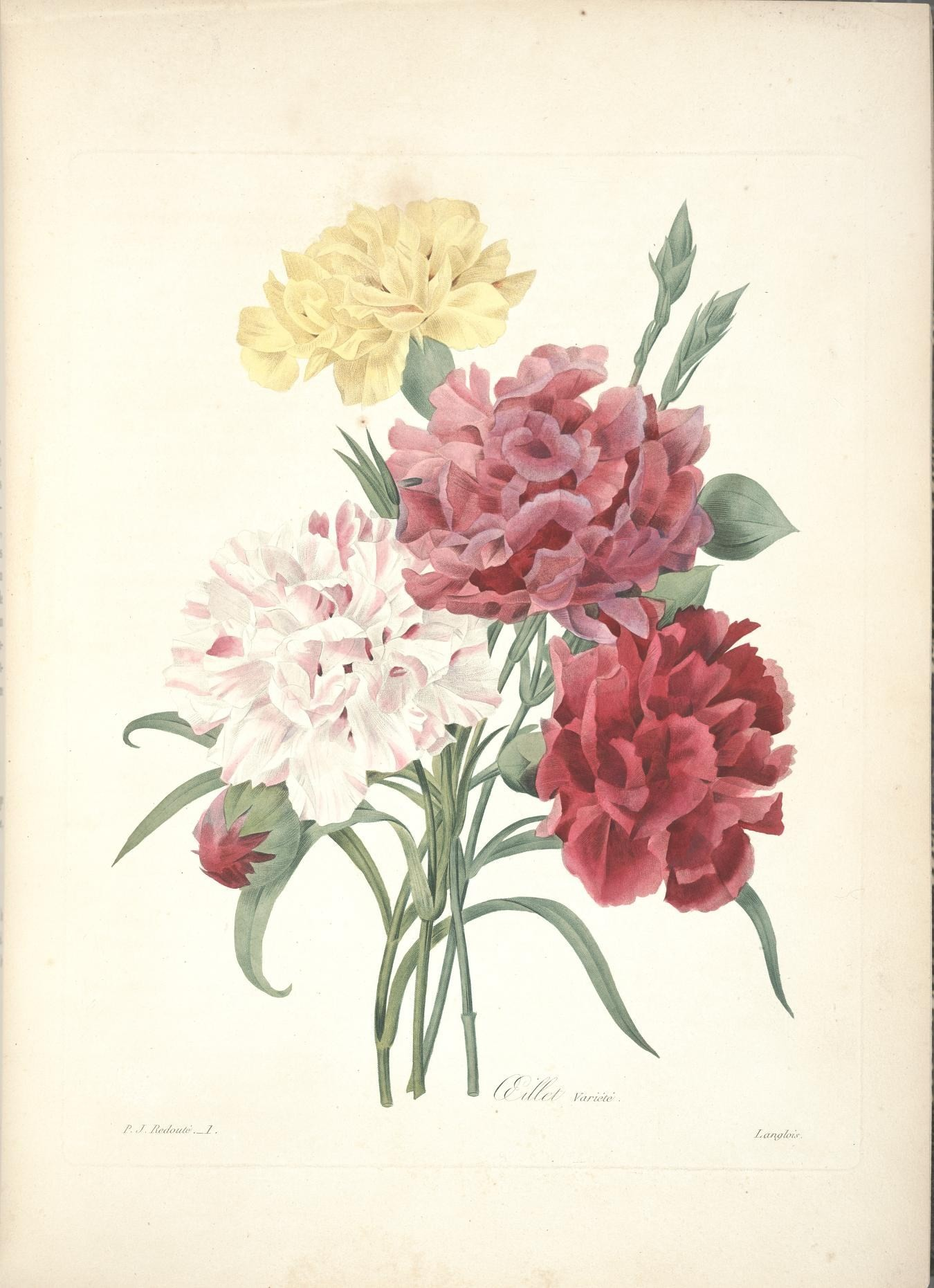 ■ ' . ■ L ■ » 1 ■ ! ■ . • ■ 1 1 , • ■ • ■ » 1 1 . ■ • ■ . . . ■ ■ . . . ■■ ... . . ■ • ■ ■ . W ■ ■ ■ • • ■ ■ . ■^^^^^^^^H 0^4 . - . Vt'Y.. ' . P. . /'. jRedoztée ' ._! I . a nç loù . /